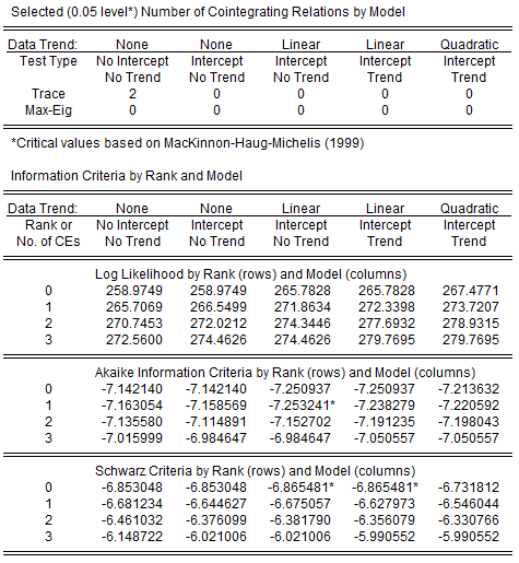 JohansenEşbütünleşme